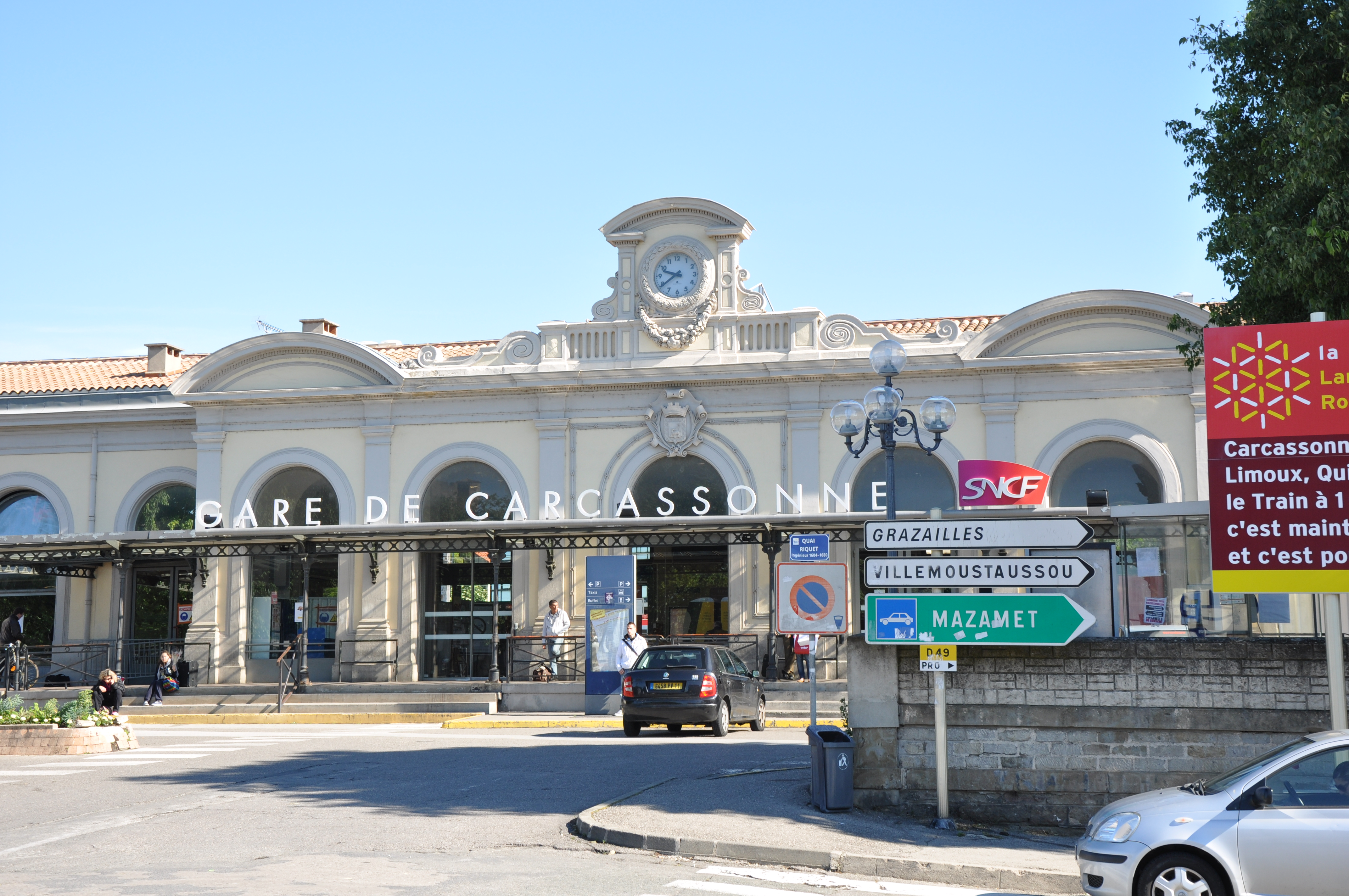 Gare de Carcassone, Languedoc-Roussillon, France